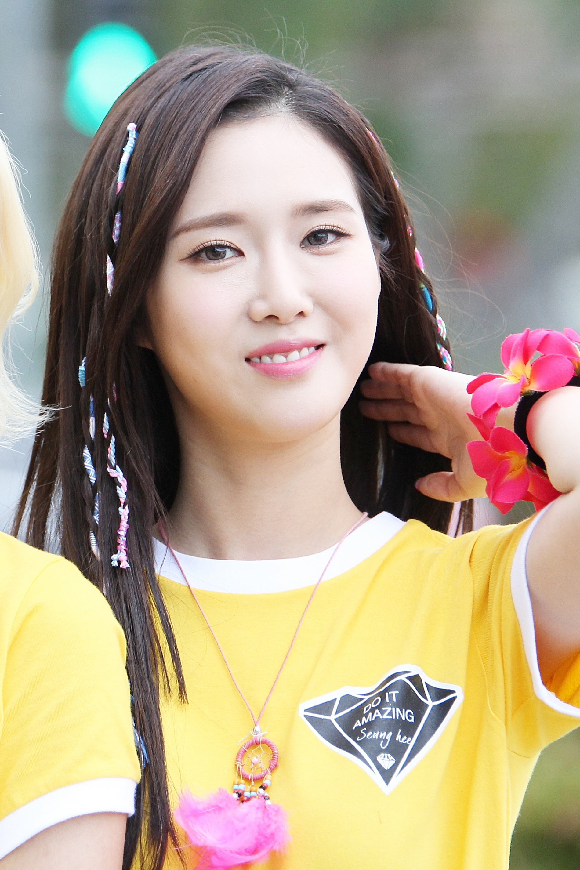 150929 다이아 - SBS 더쇼 팬미팅 DIA - SBS the show fanmeeting (13P)